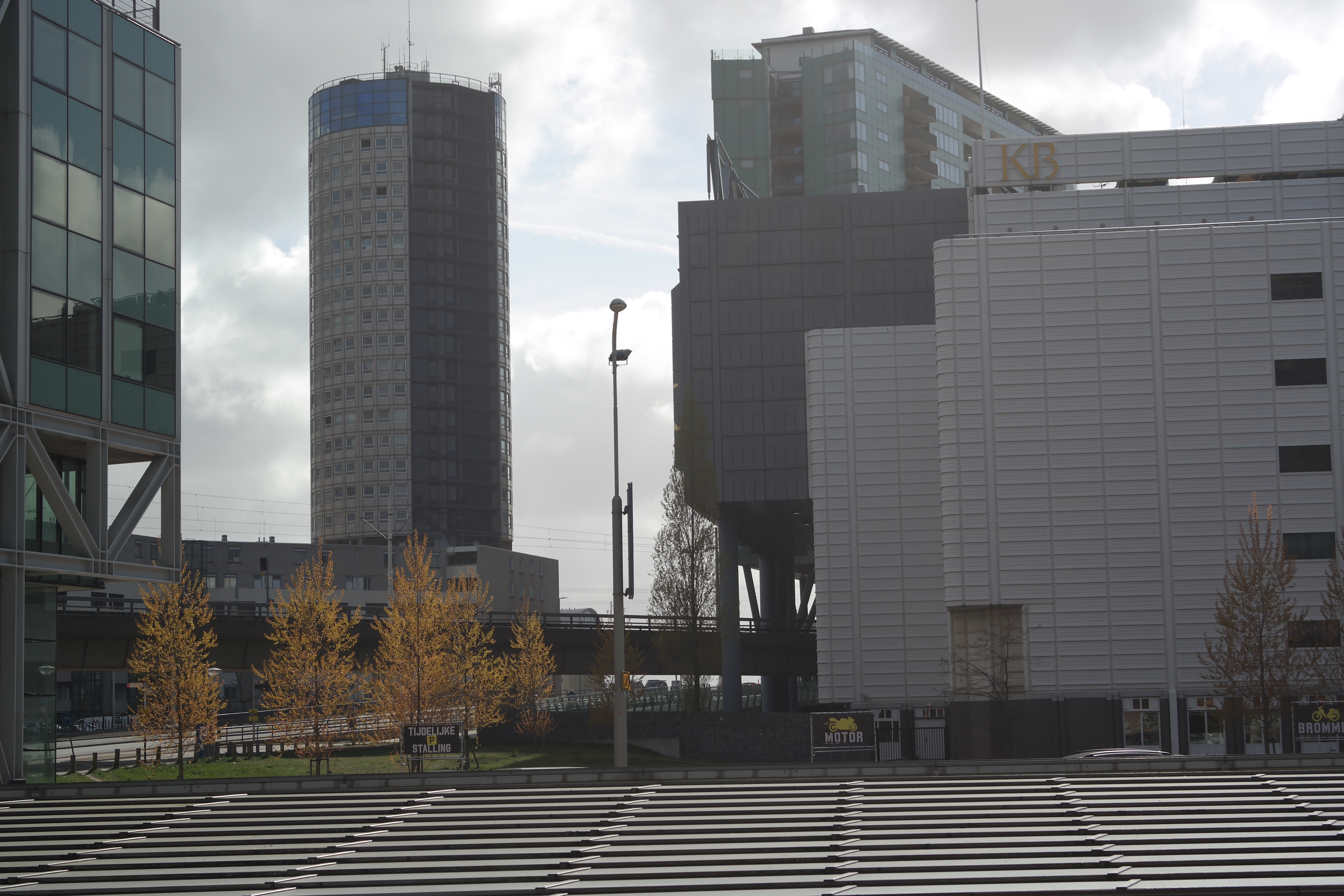 De Prins Clauslaan in Den Haag.